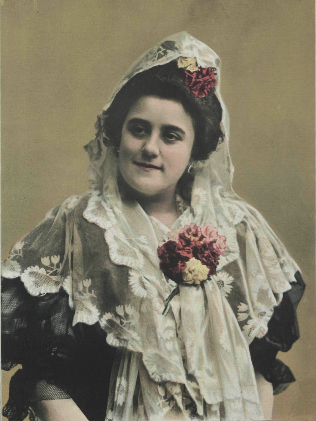 Fotografía de Rosario Pino realizada por Pablo Audouard